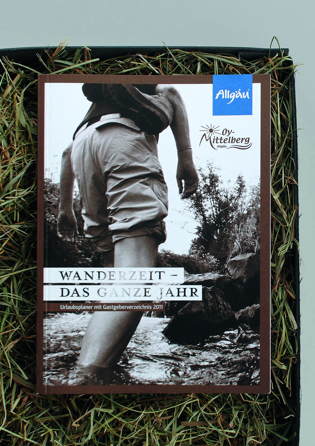 Titel der Tourismusbroschüre Oy-Mittelberg von der designgruppe Koop